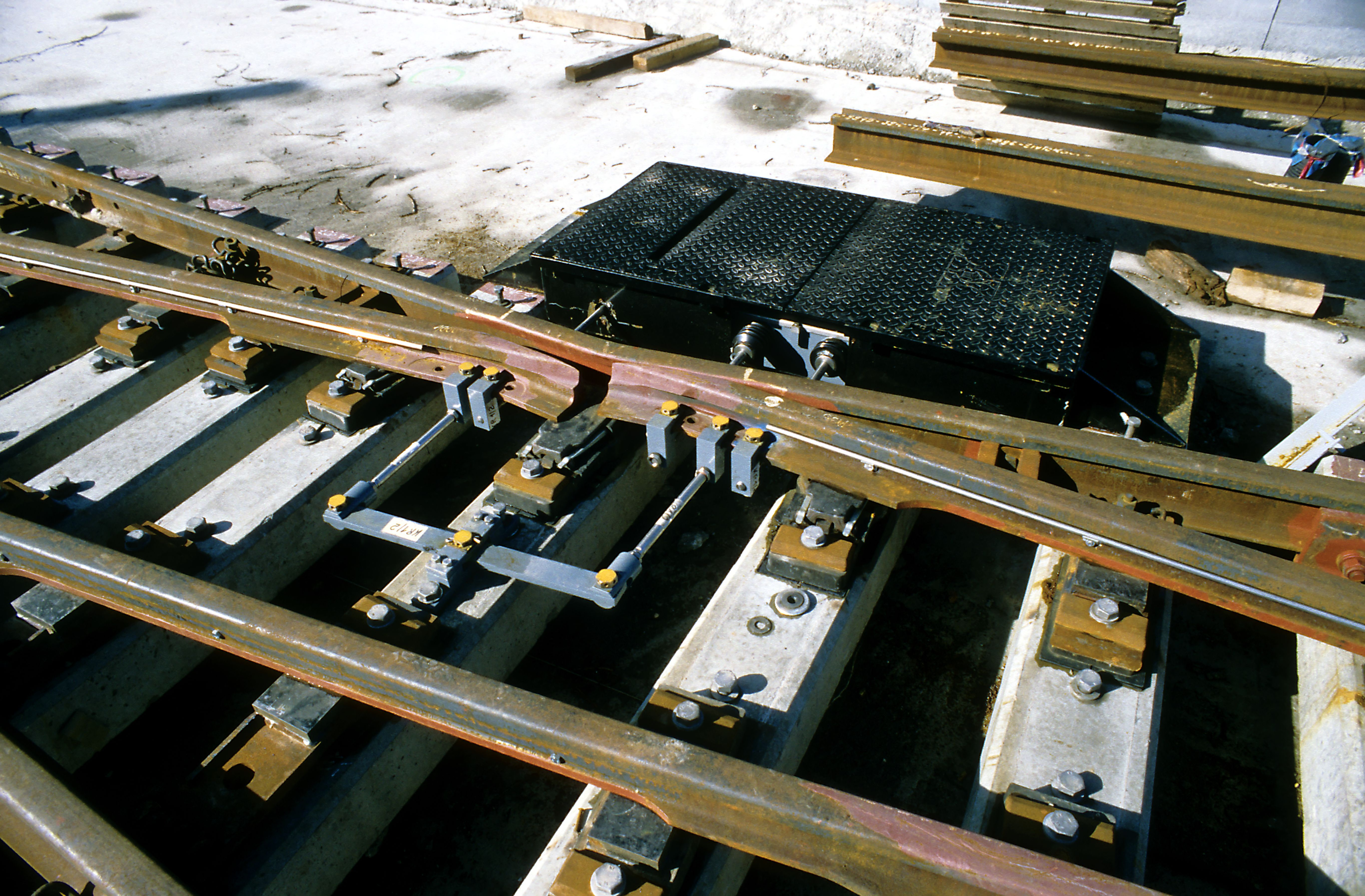 Mit einem Übertragungshebel ist für zwei Doppelherzstückspitzen nur ein Antrieb nötig. Für jede Herzstückspitze gibt es eine eigene Prüferstange.